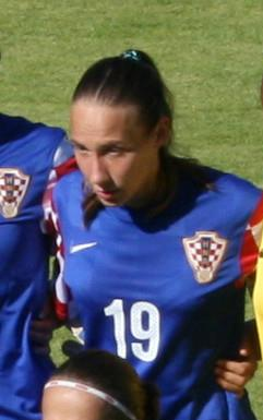 Sandra Žigić